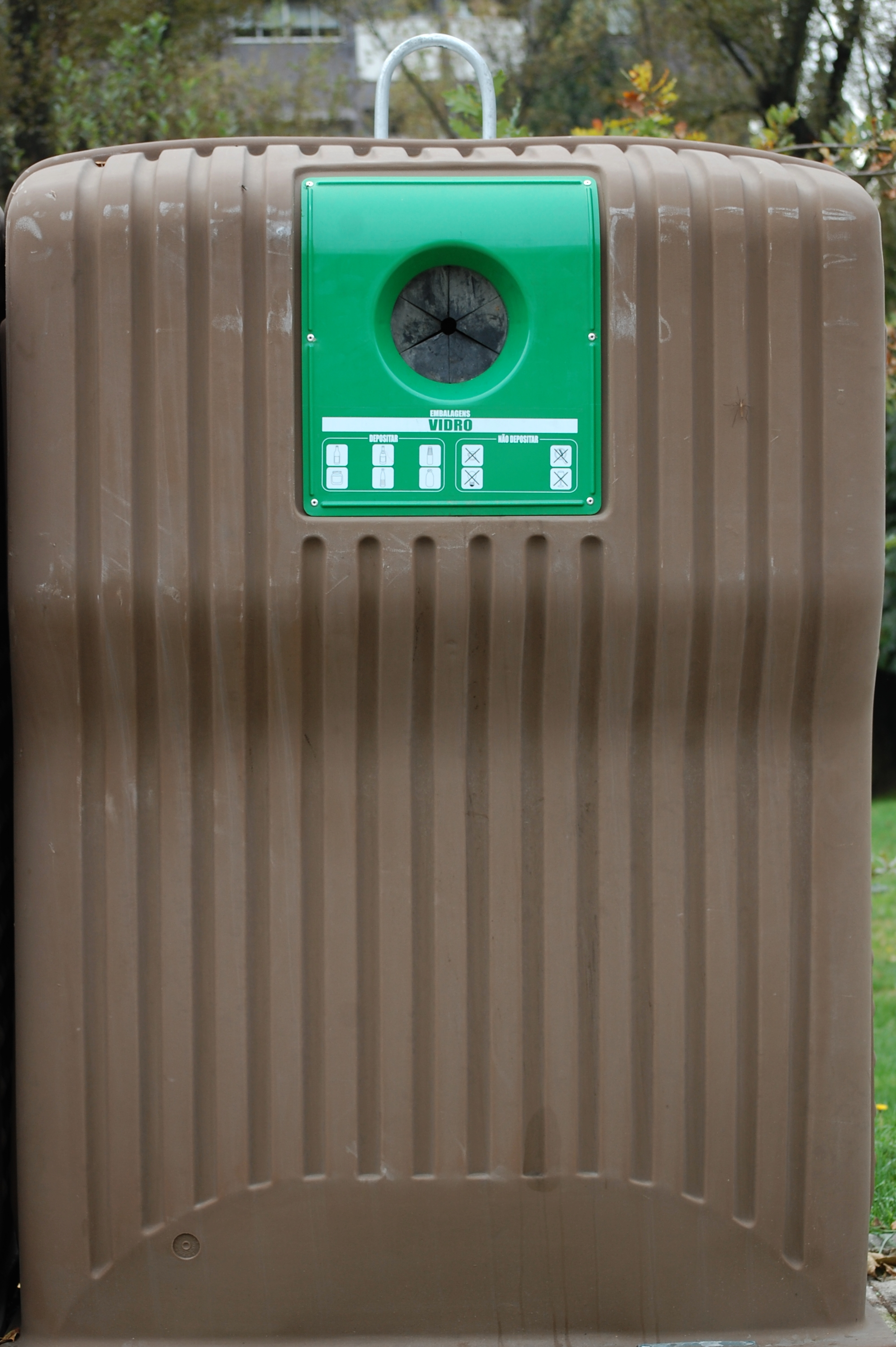 Contentor para reciclagem de vidro situado no Parque das Quintãs, Guimarães.